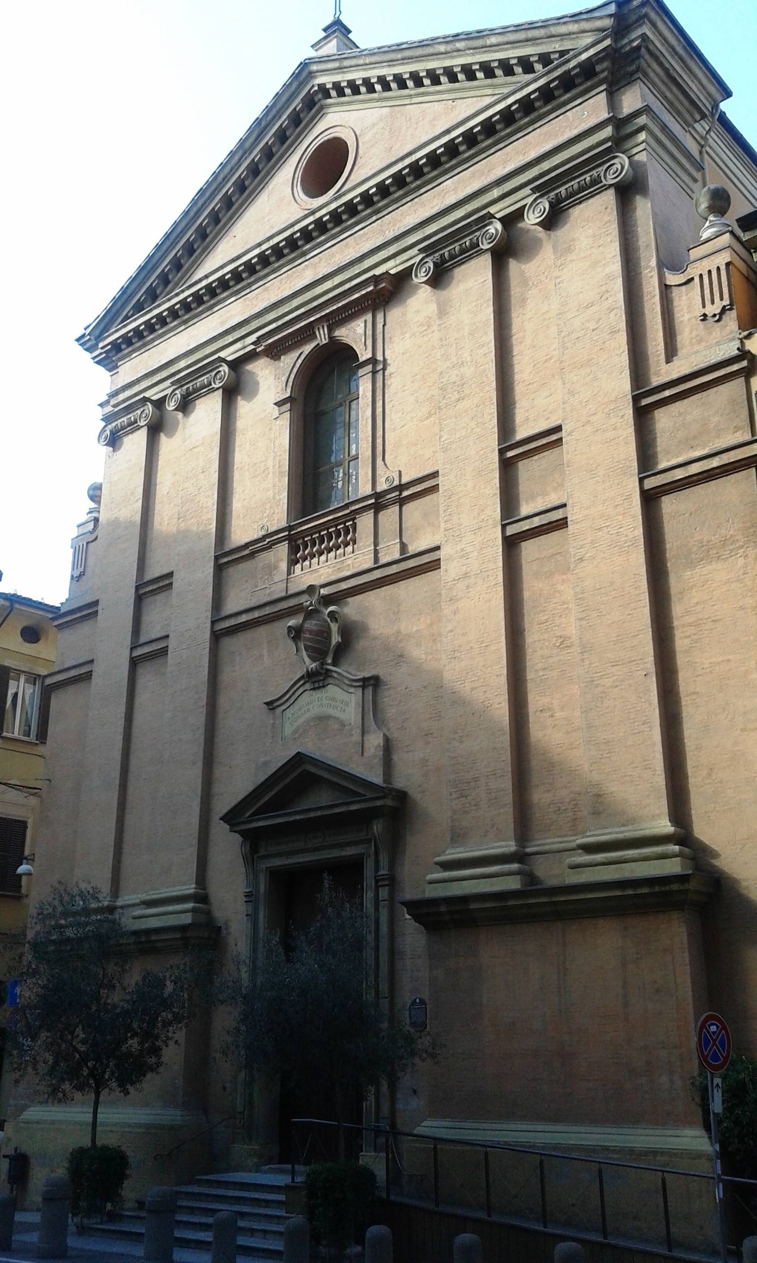 Facciata